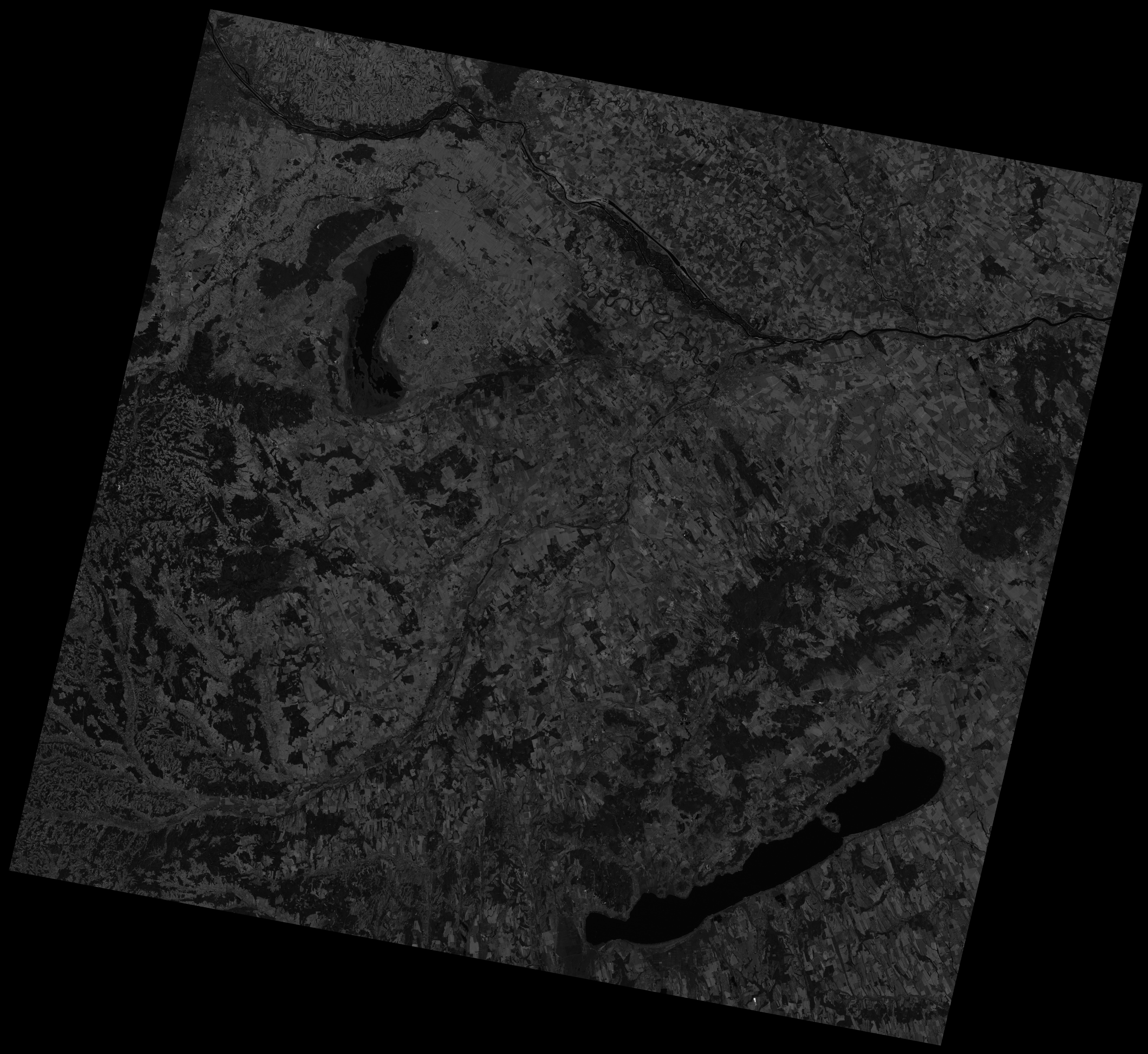 A Landsat-5 felvétele az Észak-Dunántúlról a közép infravörös (7-es) sávban